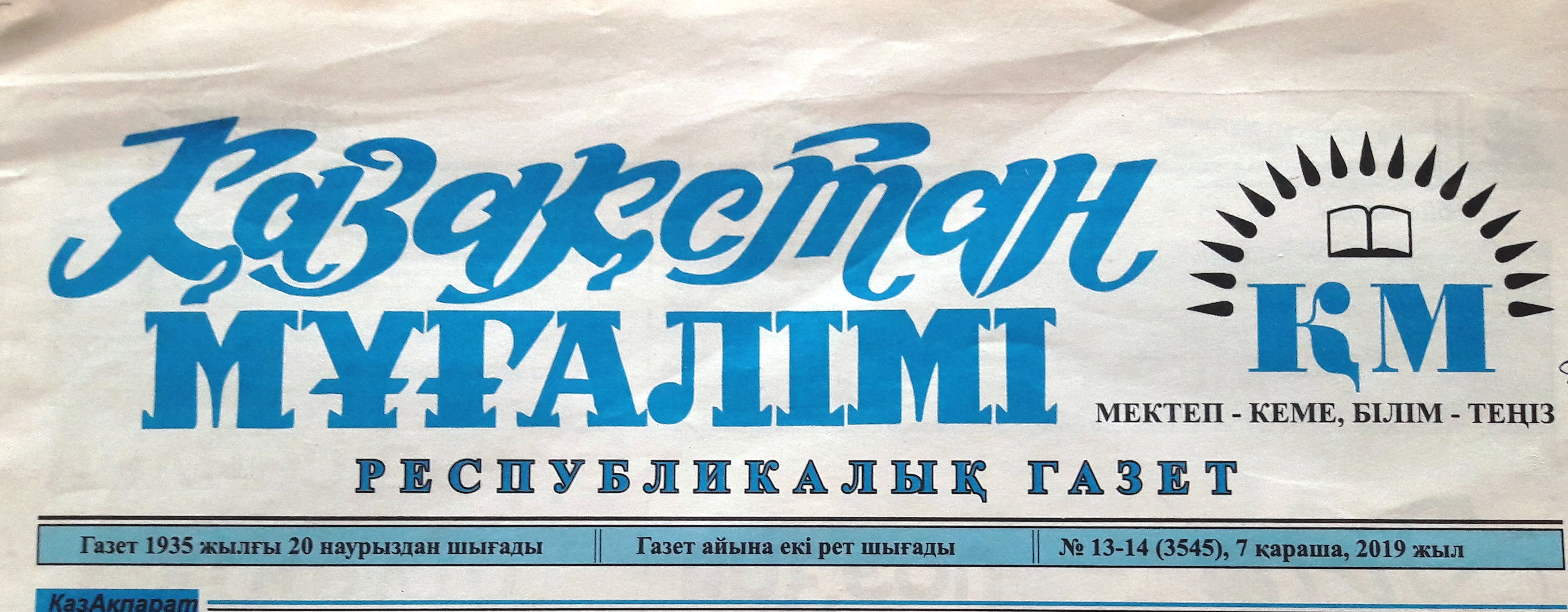 Қазақша (кирил): Газета